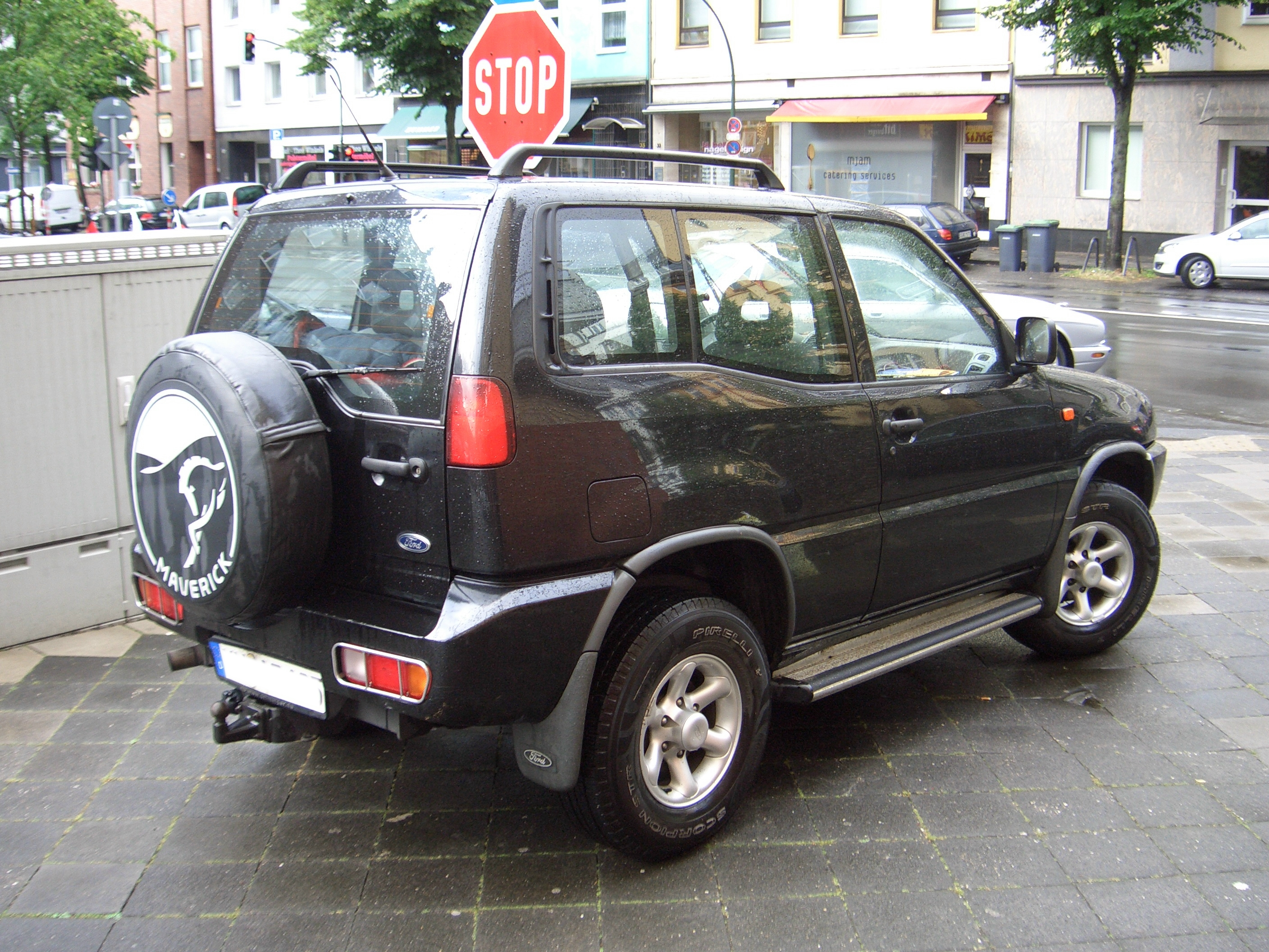 Ford Maverick I GLS 2-door (Europe), 1993-2001